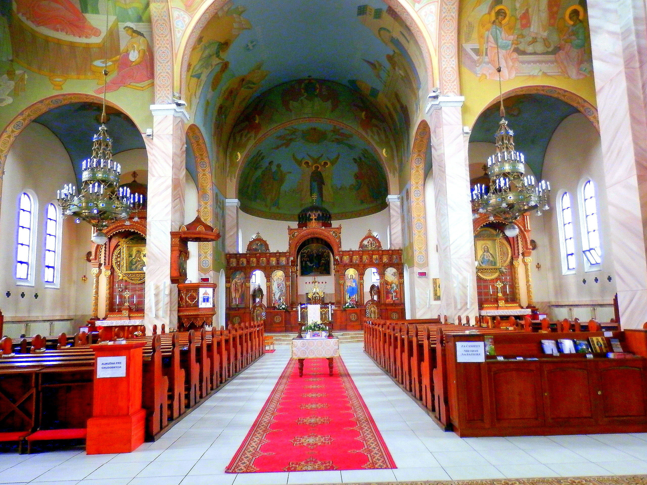 Interiér baziliky. Gréckokatolícky chrám Zoslania sv. Ducha v neobyzantskom slohu bol postavený pri kláštore redemptoristov v rokoch 1934 - 1935. V roku 2012 bol povýšený na Baziliku Minor. Historická pamiatka sa nachádza na Masarykovej ulici č.37. mesto Michalovce.